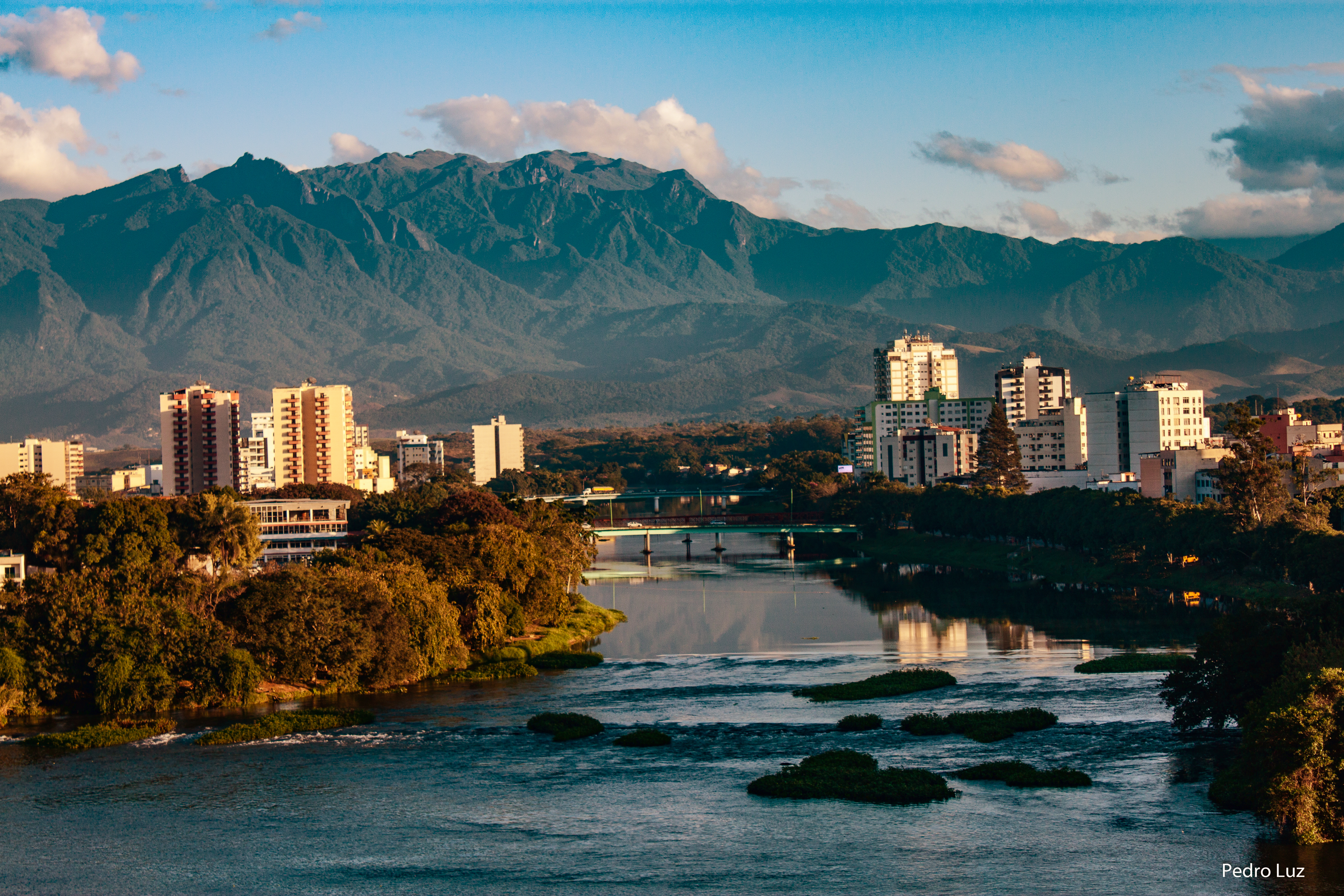 A cidade de Resende RJ, no séc IXX, já foi uma das mais desenvolvidas do interior do Estado do Rio de Janeiro, devido ao ciclo do café. Com a abolição da escravatura e o cansaço do solo, no começo do século XX, os grandes fazendeiros e produtores de café venderam tudo e se mudaram para Ribeirão Preto SP, onde encontraram a terra roxa e continuaram suas atividades.